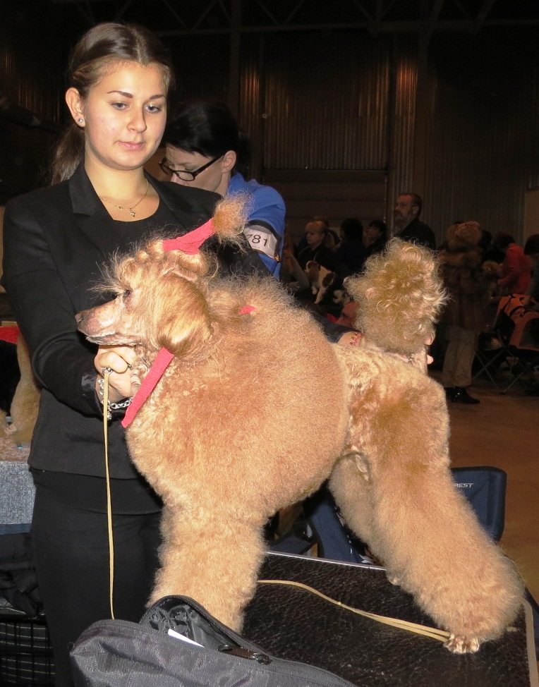 Пудель в бигуди. Тарту